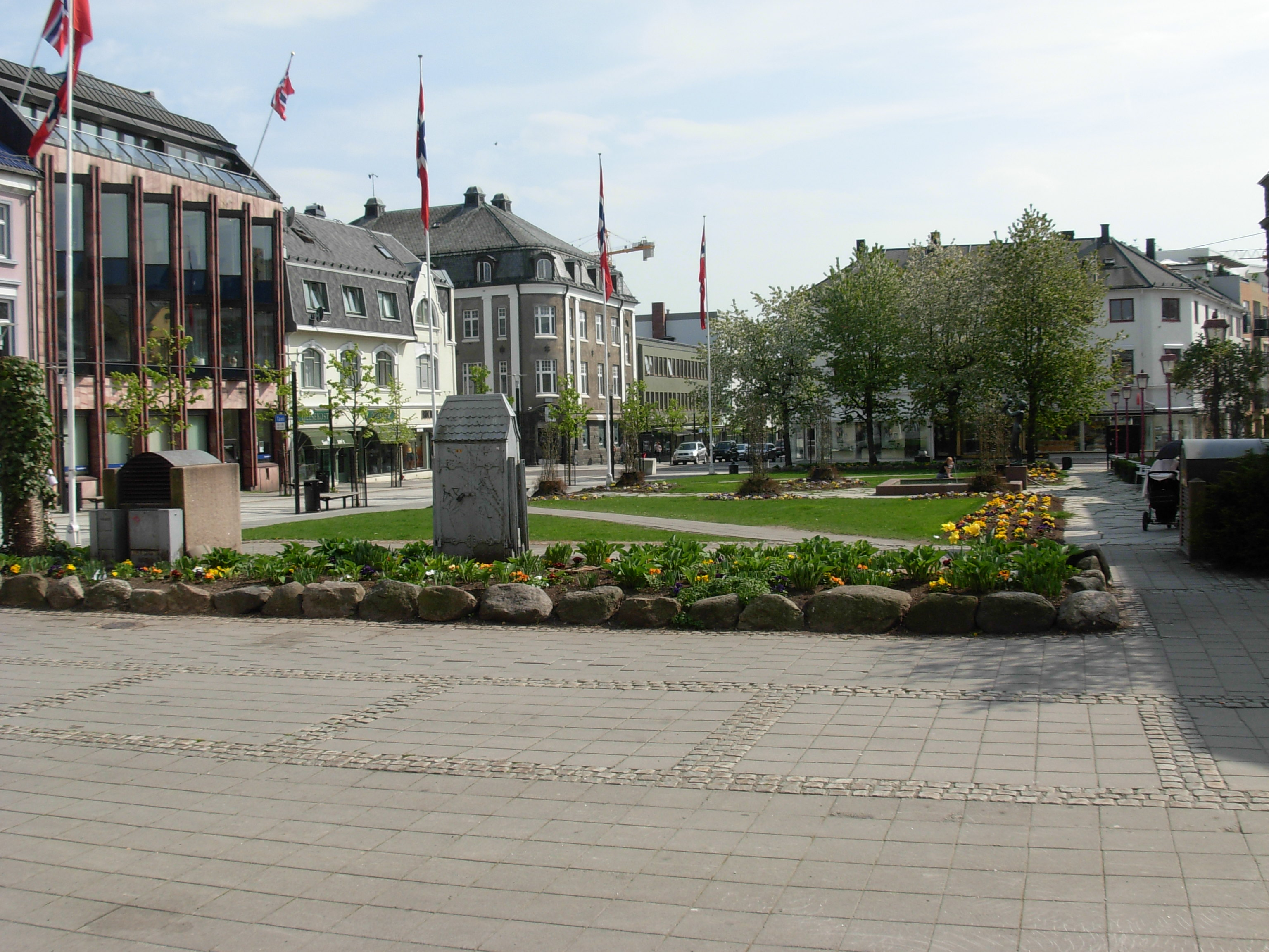 Bytunet, Sandefjord, Norway